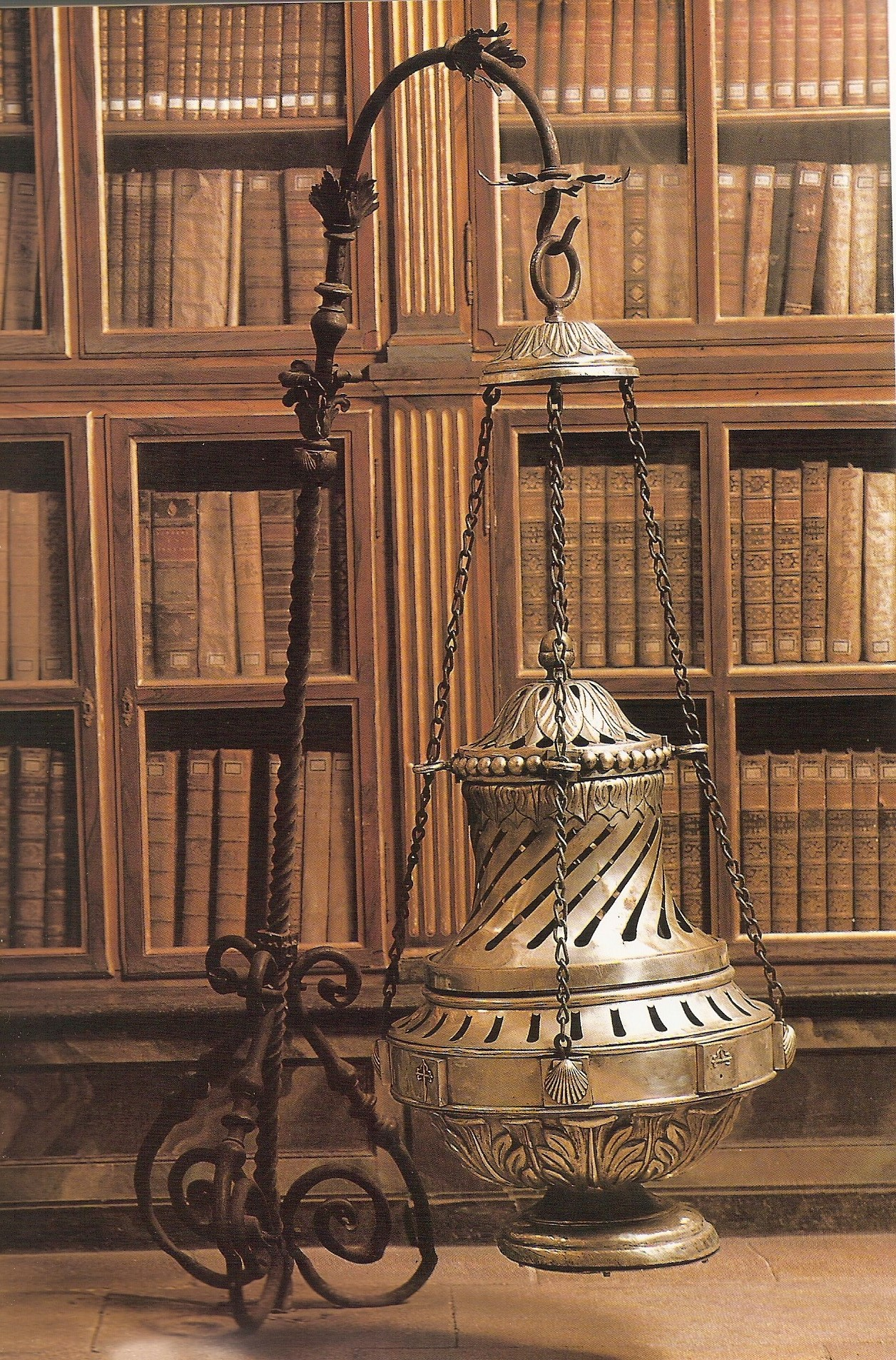 Botafumeiro. Catedral de Santiago de Compostela, Galicia, (España).